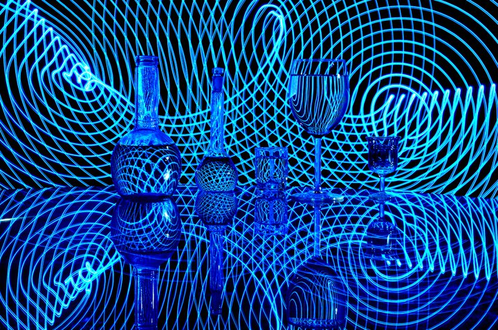 Пример люминографии. (Камера закреплена на штативе, а свет перемещается на фоне натюрморта).Время экспозиции: 6 сек.